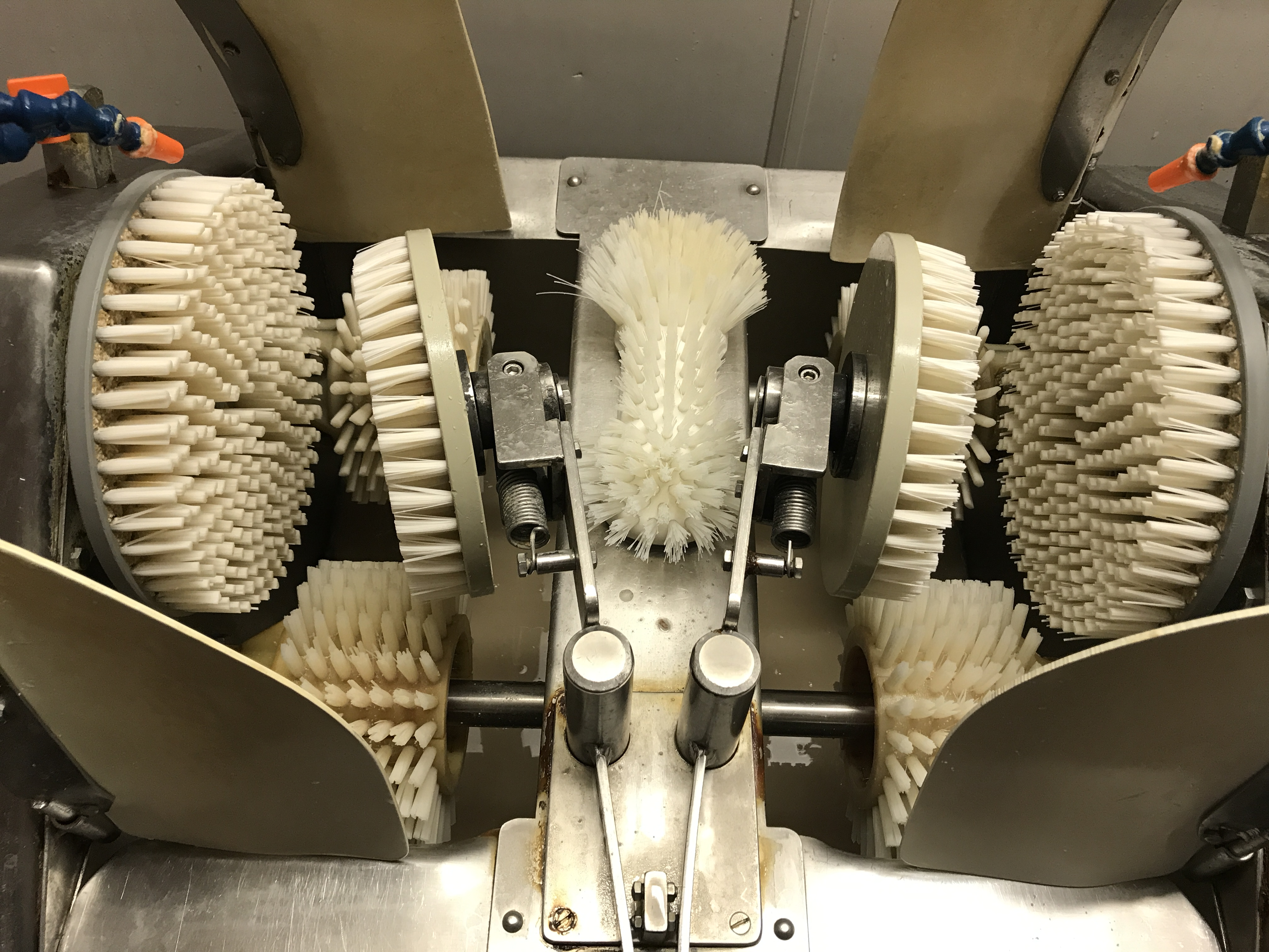 Käseschmiermaschine in Splügen GR